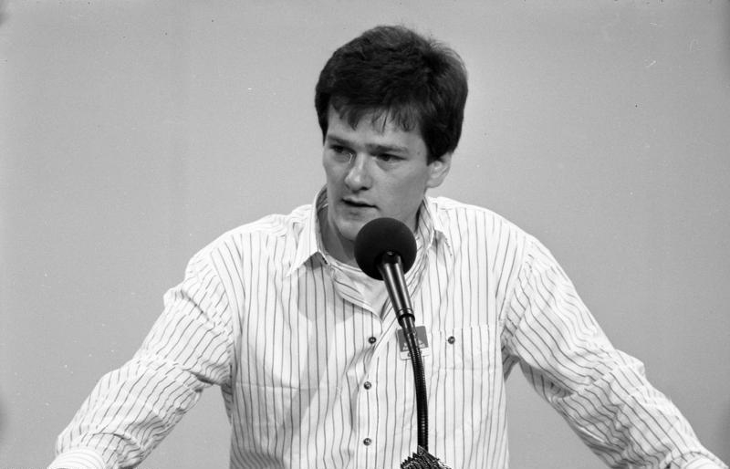 11.-13.9.1989 37. Bundesparteitag der CDU in der Bremer Stadthalle.